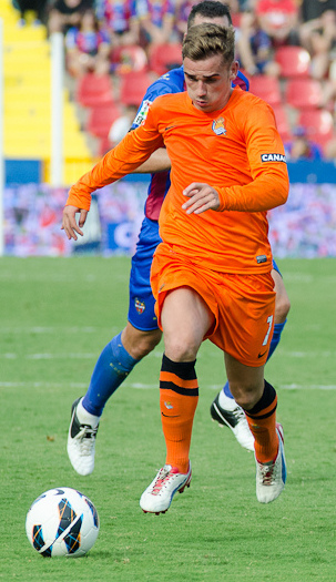 Imatges del partit Llevant-Reial Societat